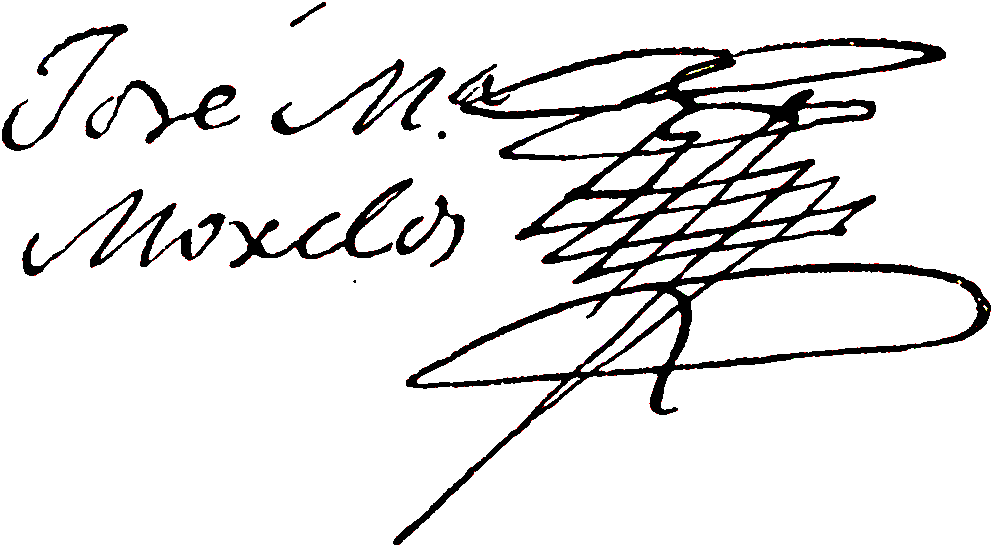 Imagen extraida del libro de Vicente Riva Palacio, Julio Zárate (1880) "México a través de los siglos" Tomo III: "La guerra de independencia" (1808 - 1821)